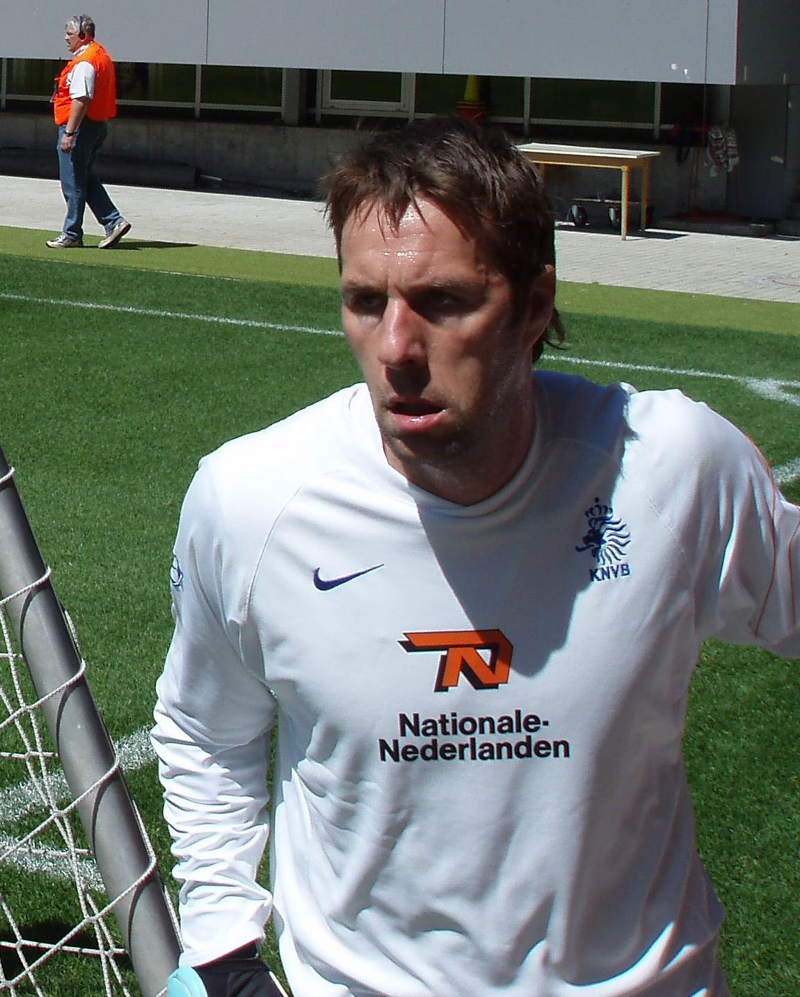 Henk Timmer, Spieler der niederländischen Fußballnationalmannschaft